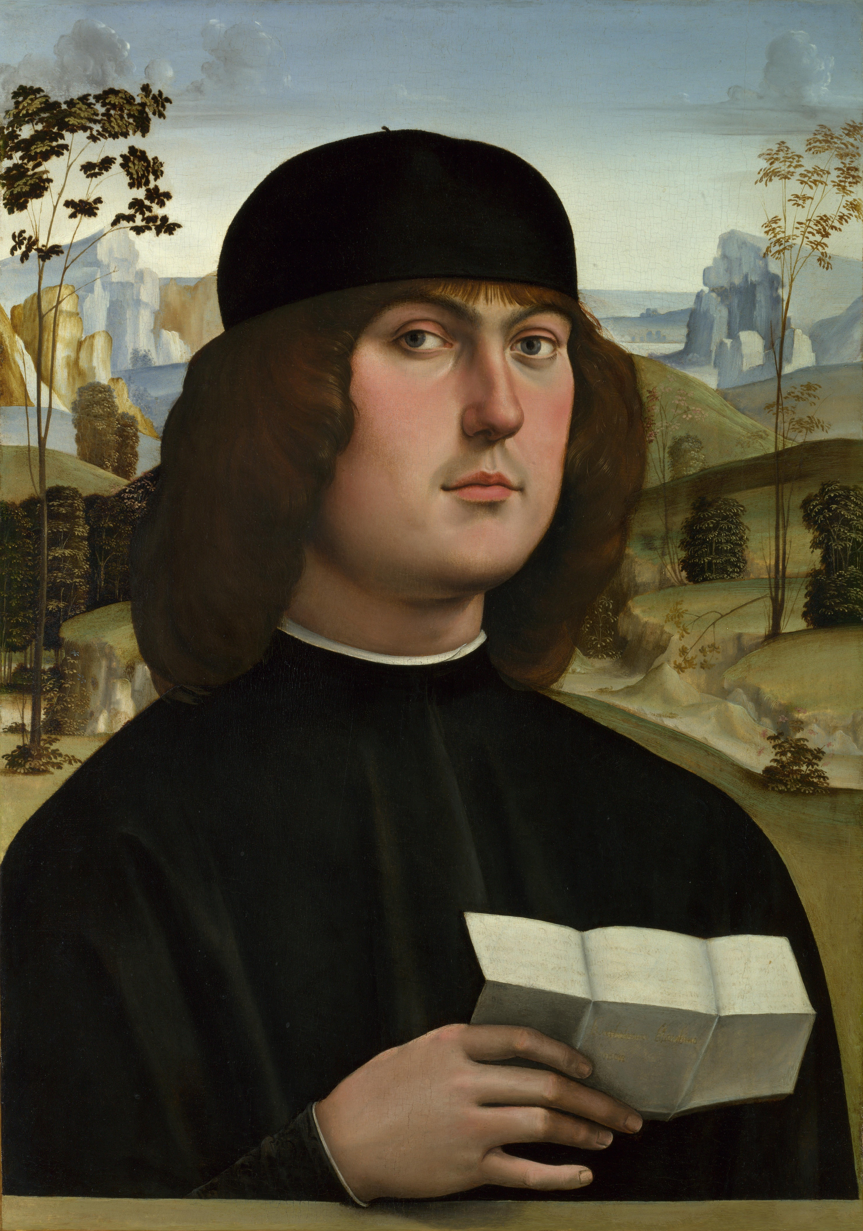 Francesco Francia, Bartolomeo Bianchini, National Gal, London